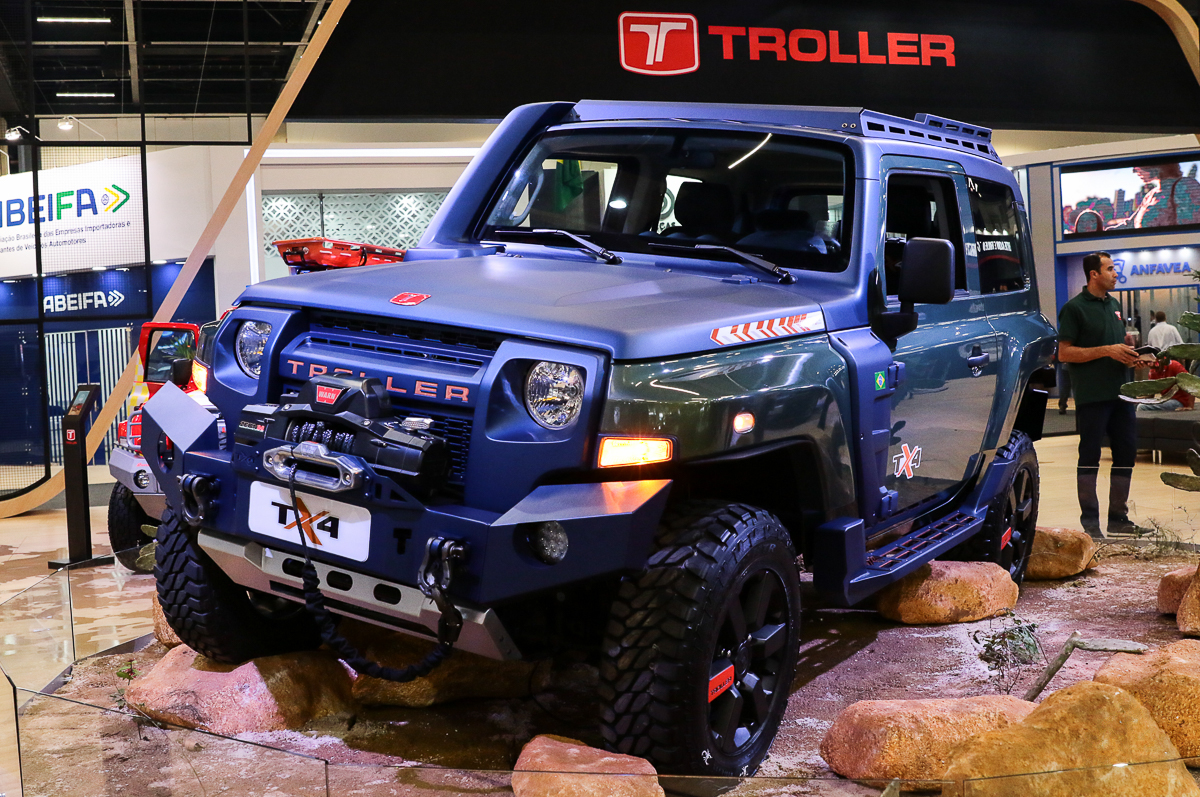 Salão do Automóvel 2018